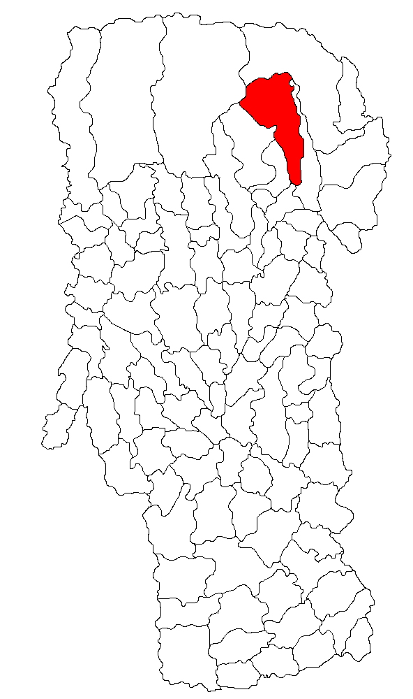 Categorie:Hărţi ale judeţului Argeş